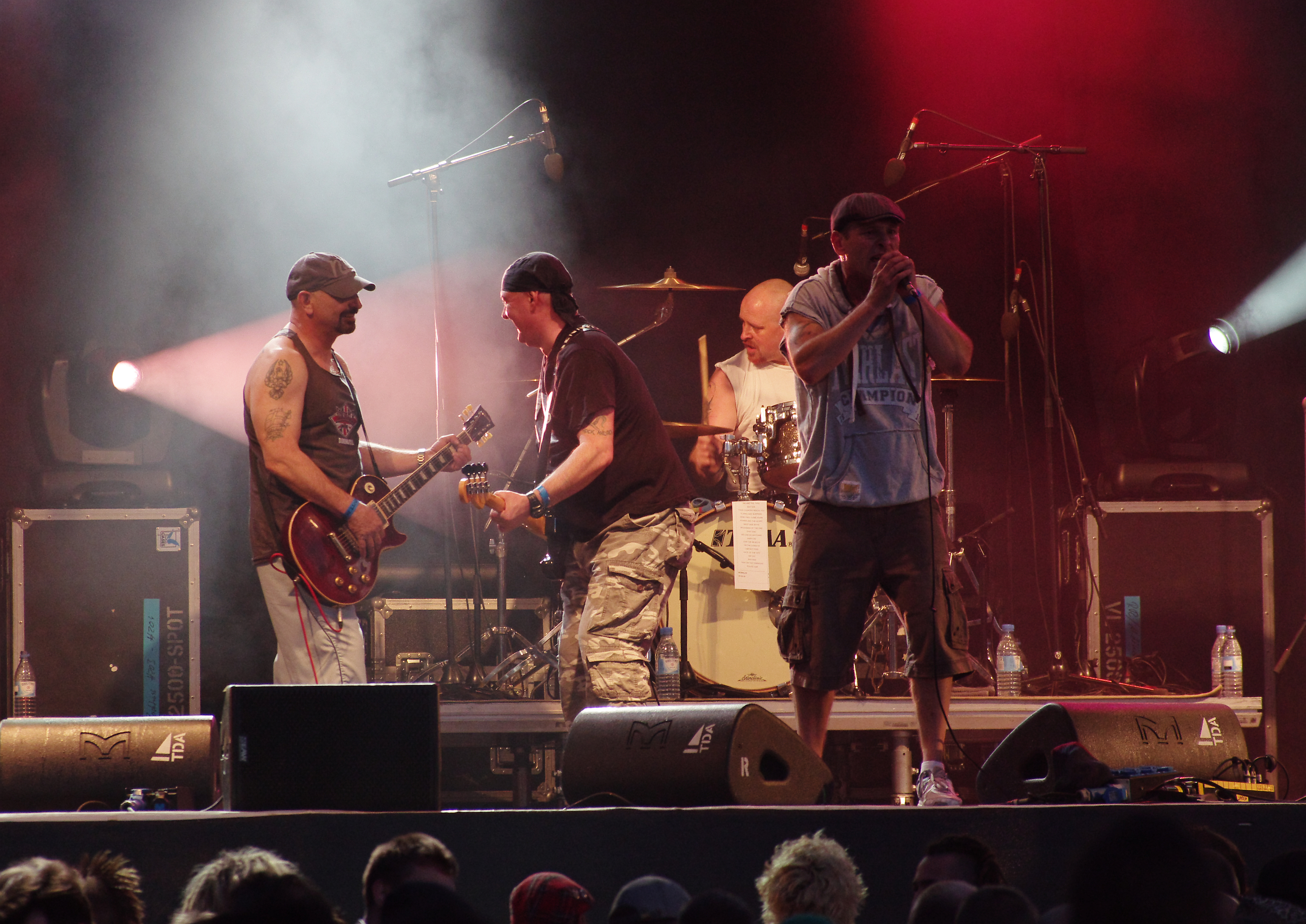 Cockney Rejects beim Ruhrpott Rodeo 2013 in Hünxe.